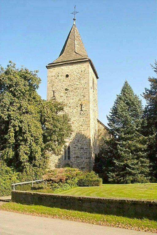 ST.Cosmae et Damiani Kirche